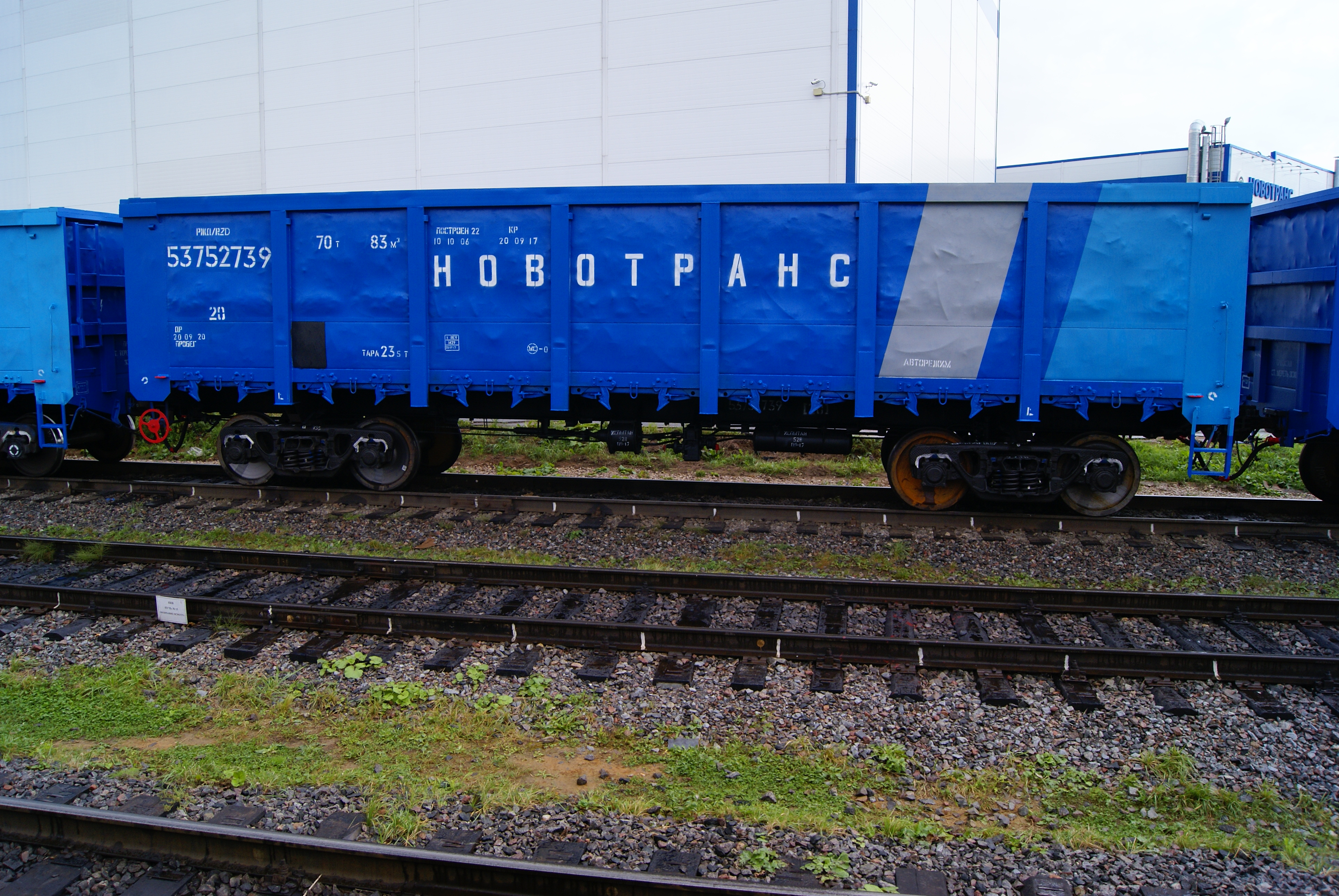 Open top car "Novotrans" (Russia)